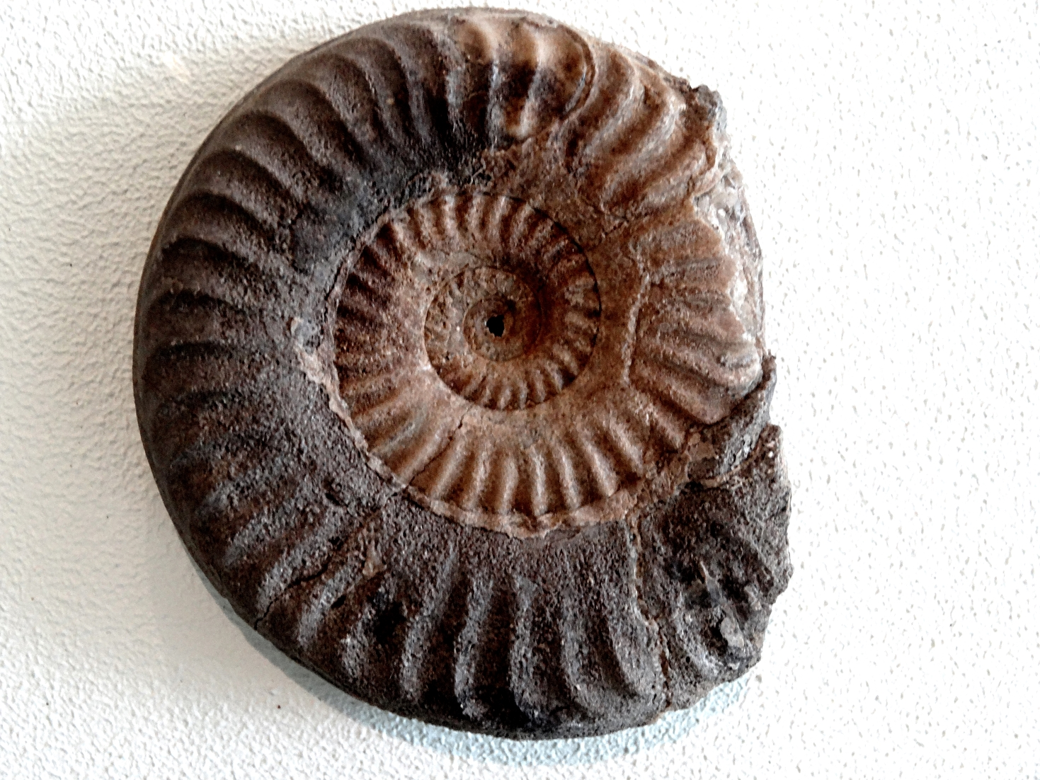 Ammonit Grammoceras thouarsense aus dem Schwarzen Jura der Fränkischen Alb; Fundort nahe Bad Staffelstein/Oberfranken; Exponat in der Petrefaktensammlung Kloster Banz